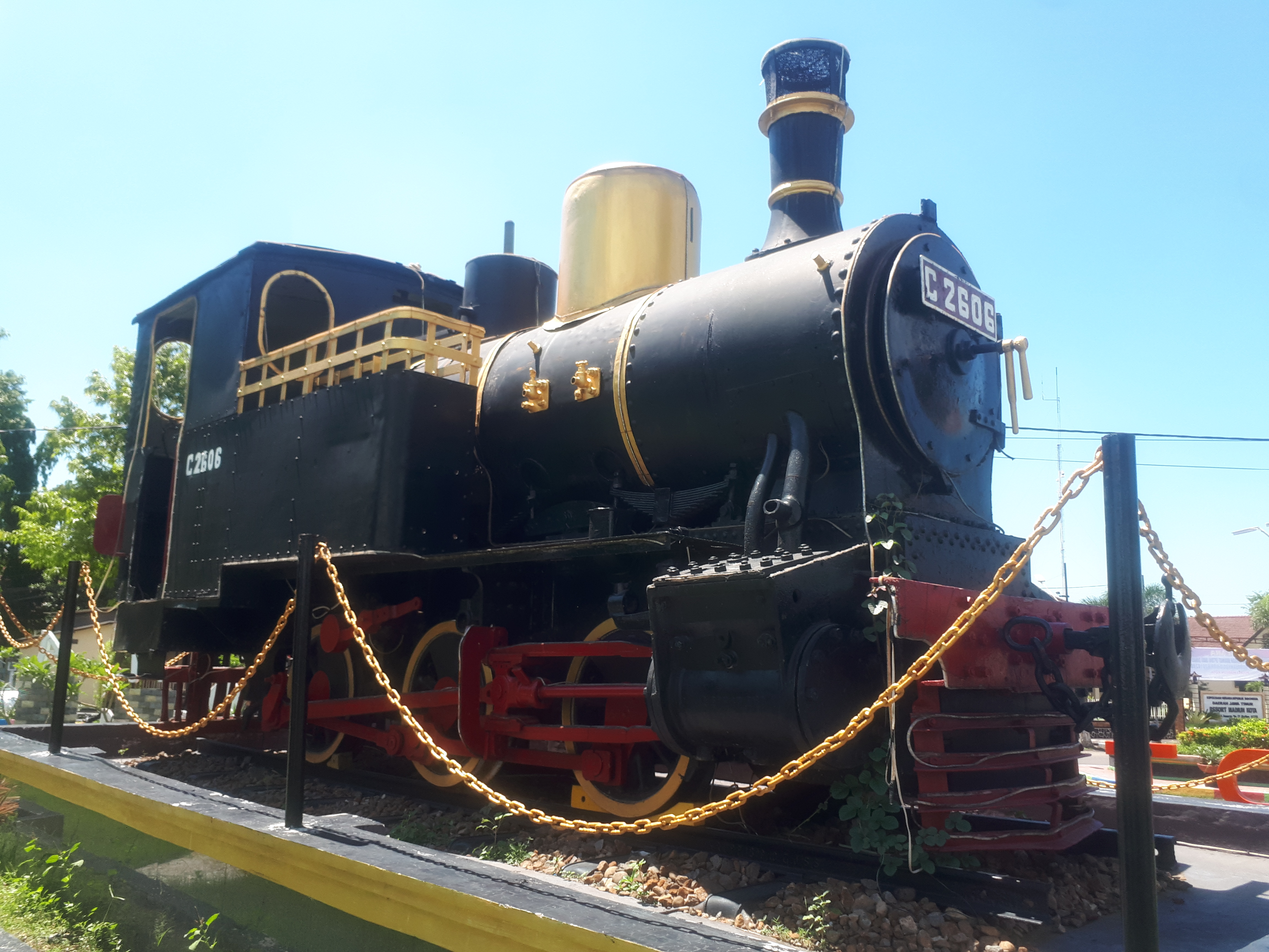 Monumen lokomotif C2606 di barat Stasiun Madiun, yang juga merupakan salah satu lambang perkembangan perkeretaapian di Madiun